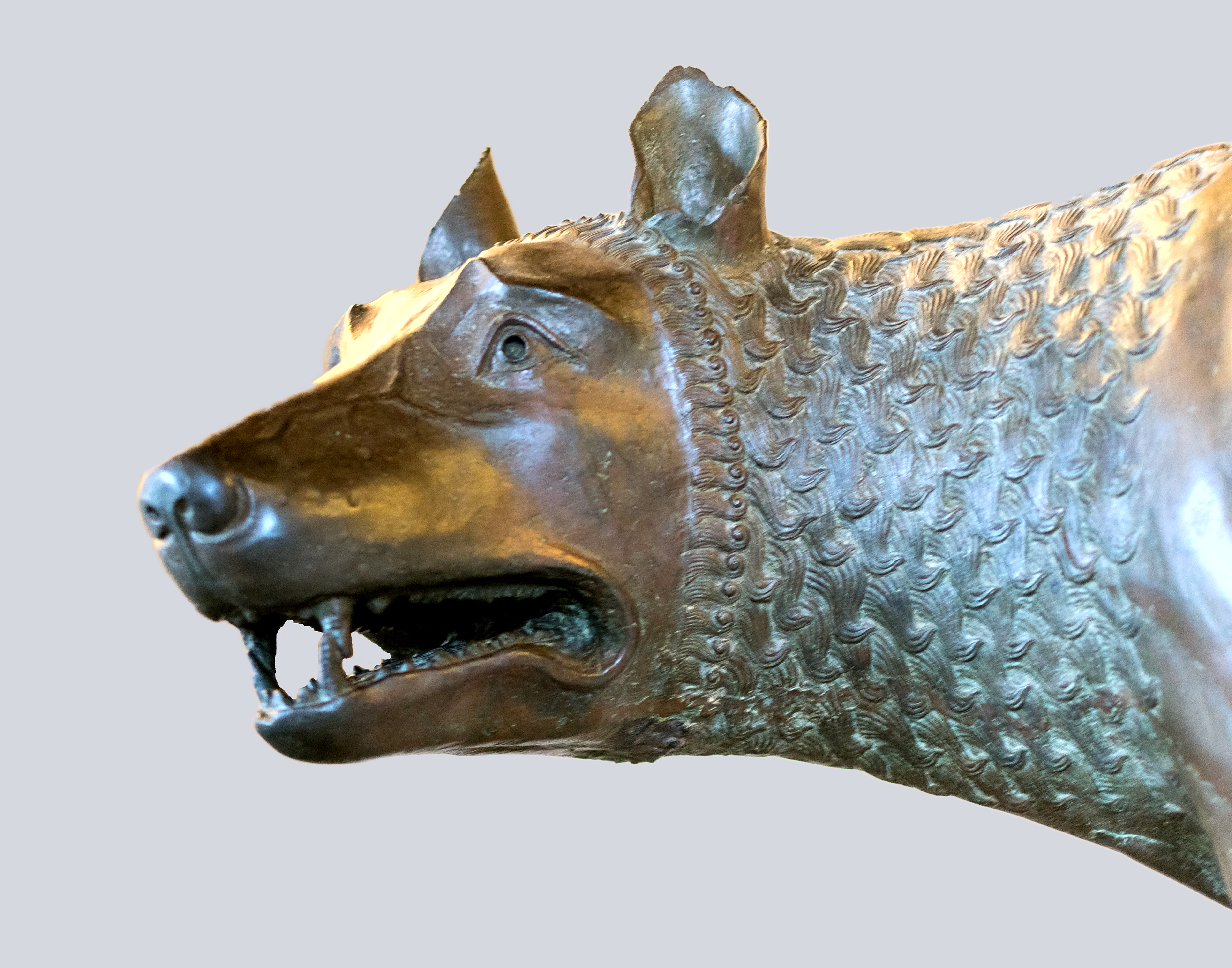 Detailaufnahme vom Kopf der Kapitolinischen Wölfin